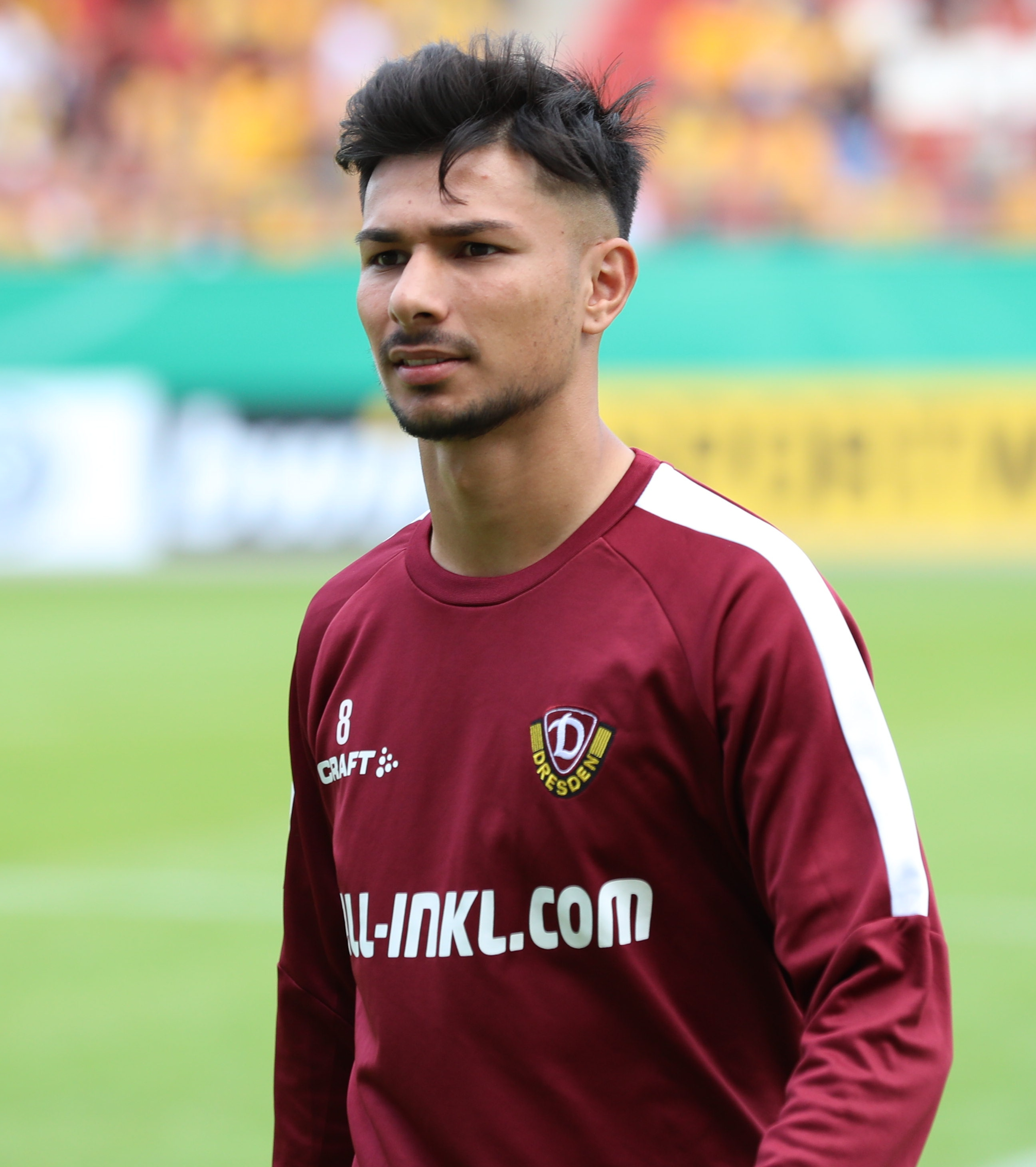 DFB-Pokal 2019/20, 1. Hauptrunde, TuS Dassendorf gegen SG Dynamo Dresden 0:3 (0:1)